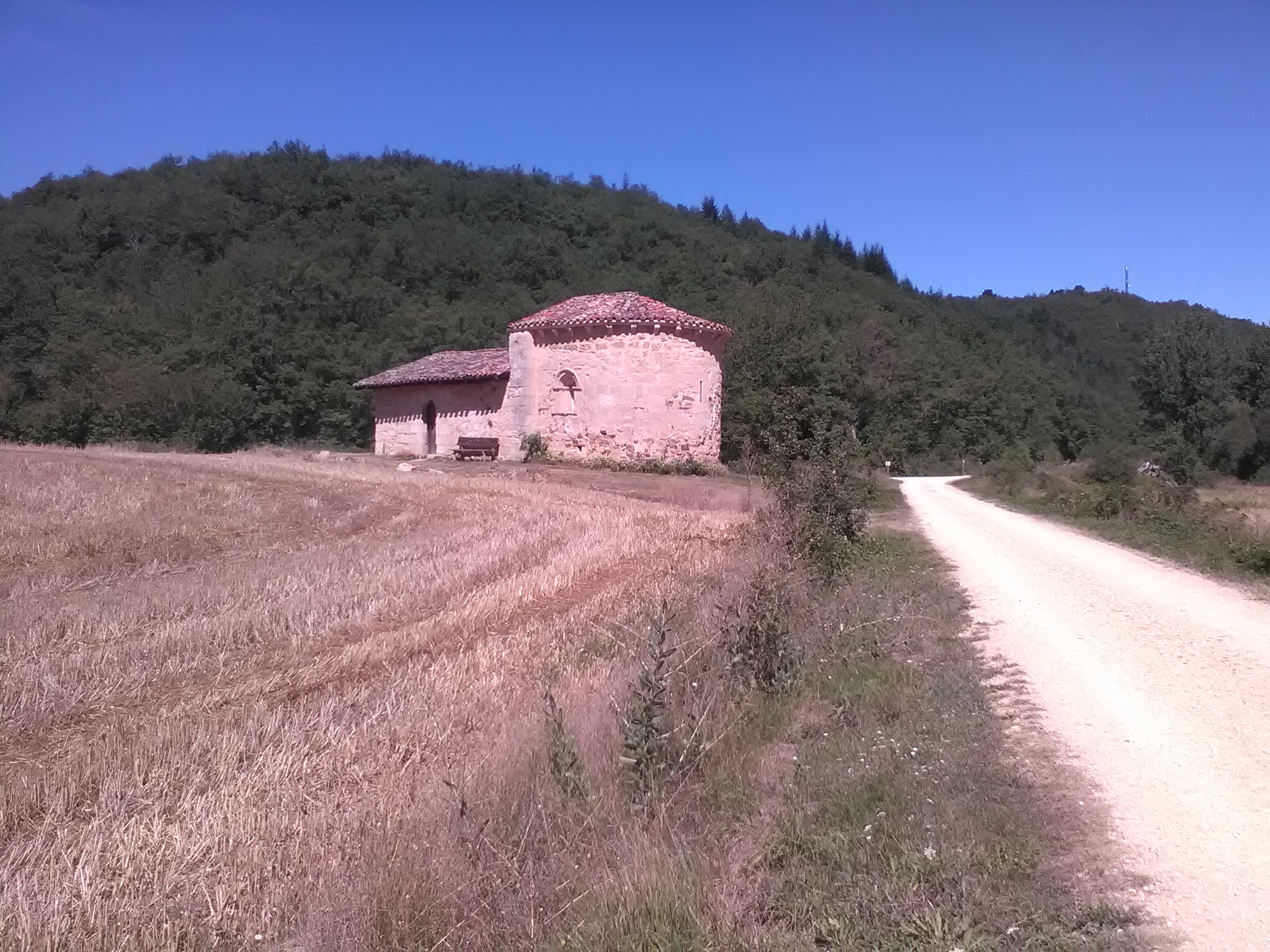 Bakardadearen baseliza. Atauri. 2017-8-12